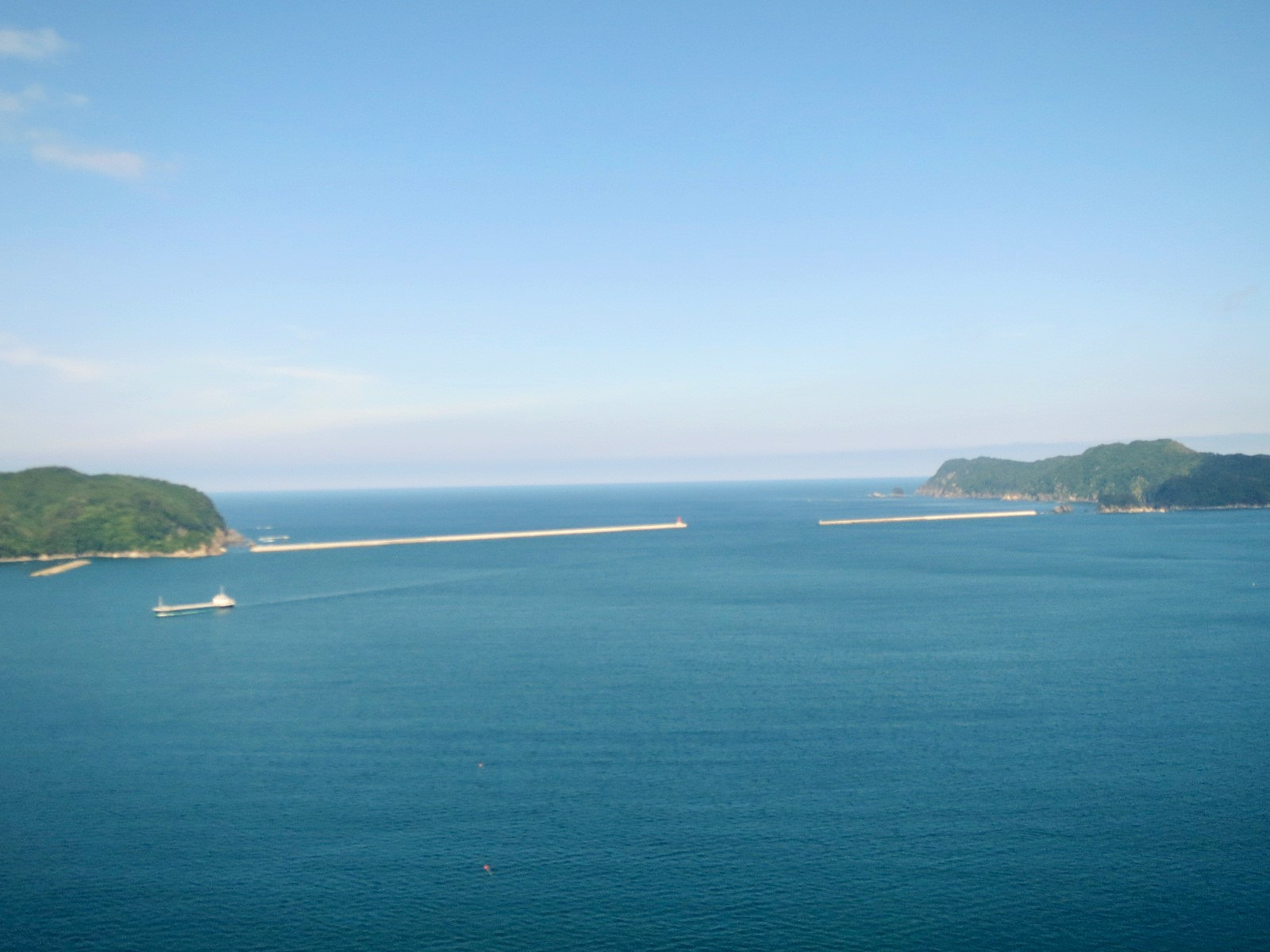 釜石湾港防波堤 Canon IXY 3